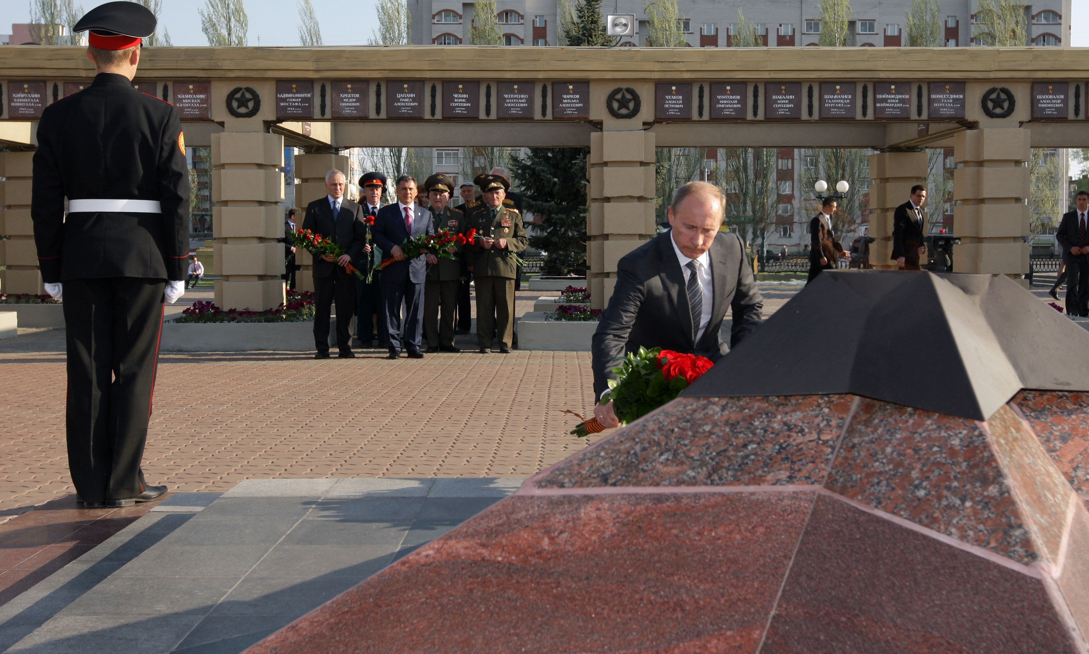 Председатель Правительства Российской Федерации В. В. Путин на церемонии возложения цветов к Вечному огню в казанском Парке Победы.